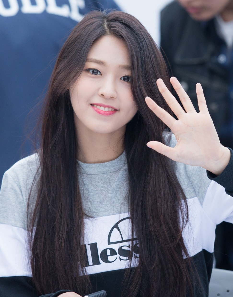 160408 엘레쎄 팬싸인회 AOA